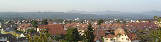 Blick übere nördliche/westliche Teil vo Möhli - Fotigrafiert vo Sunrise (DiMelina) im Herbscht 2004